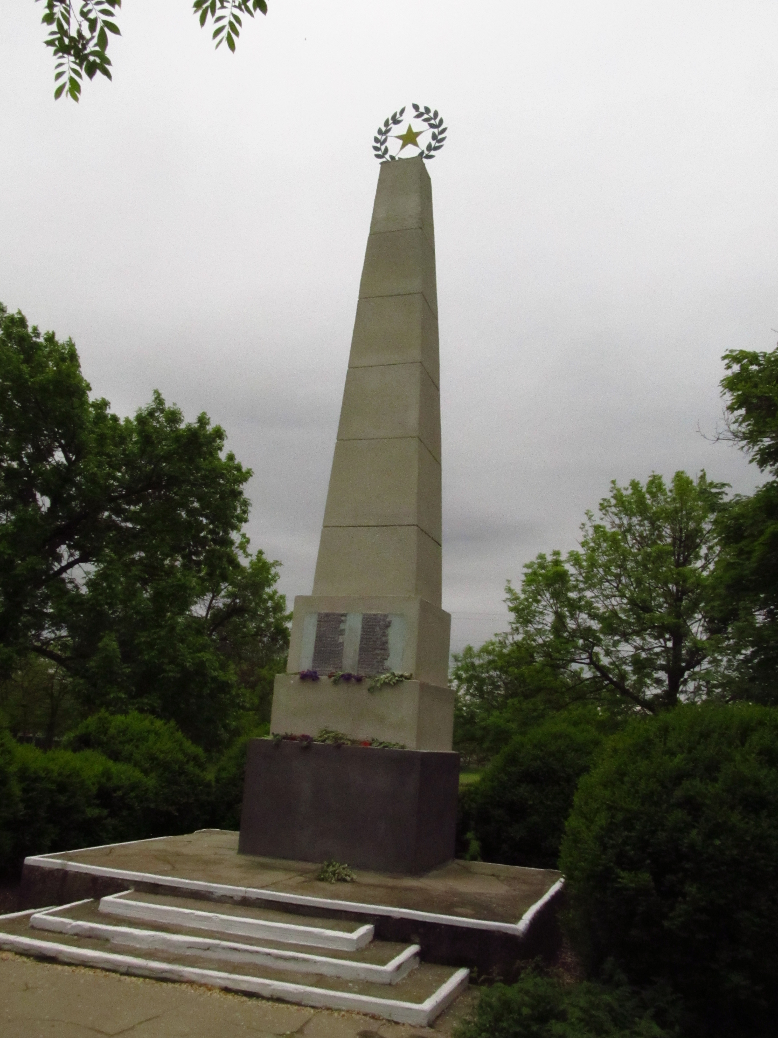 Пам’ятник 20 льотчикам 67 авіавинищувального полку, які загинули в повітряних боях в перші дні війни, Залізничне, біля Палацу культури